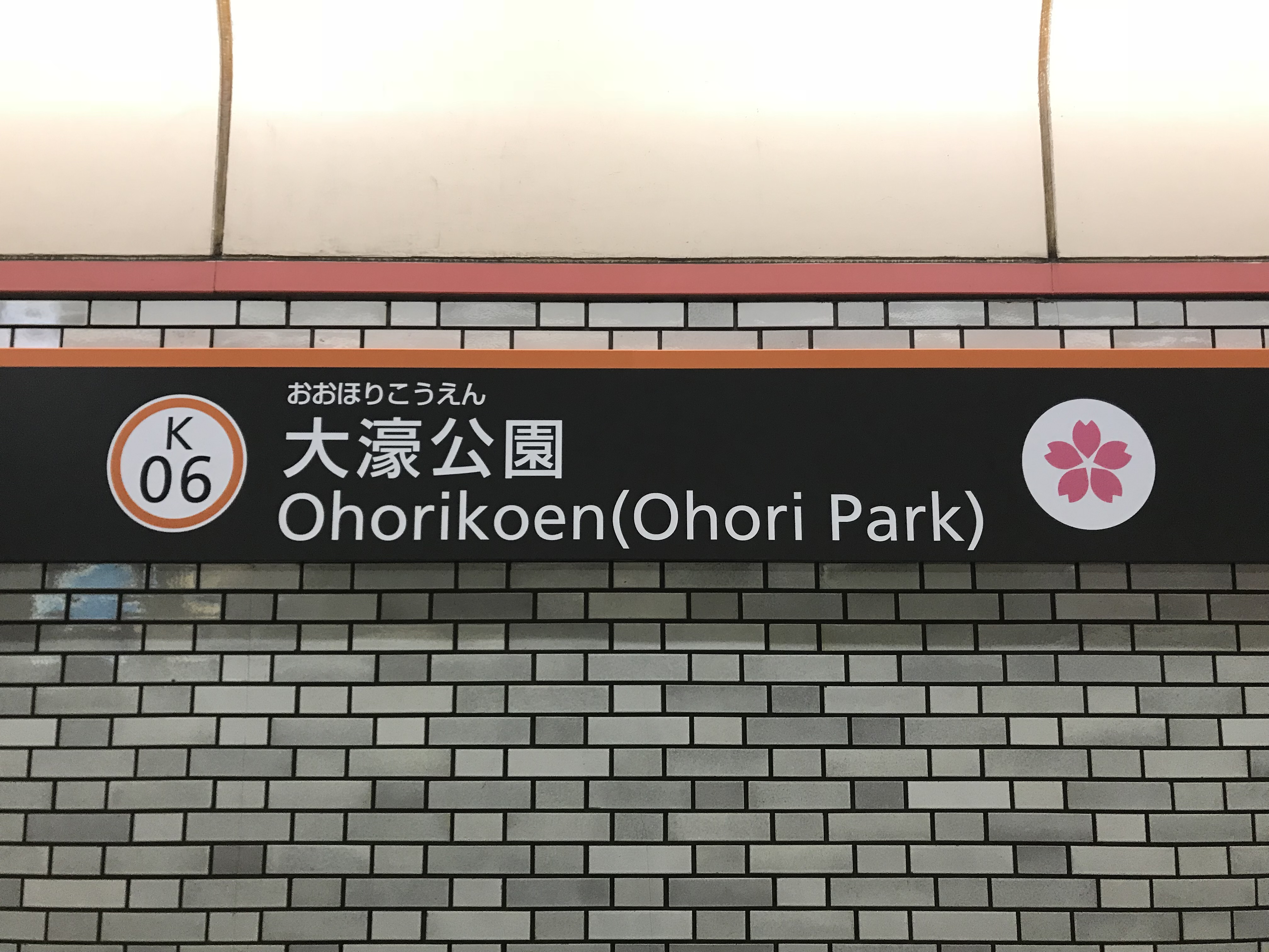 大濠公園駅の駅名標。イラストはサクラ